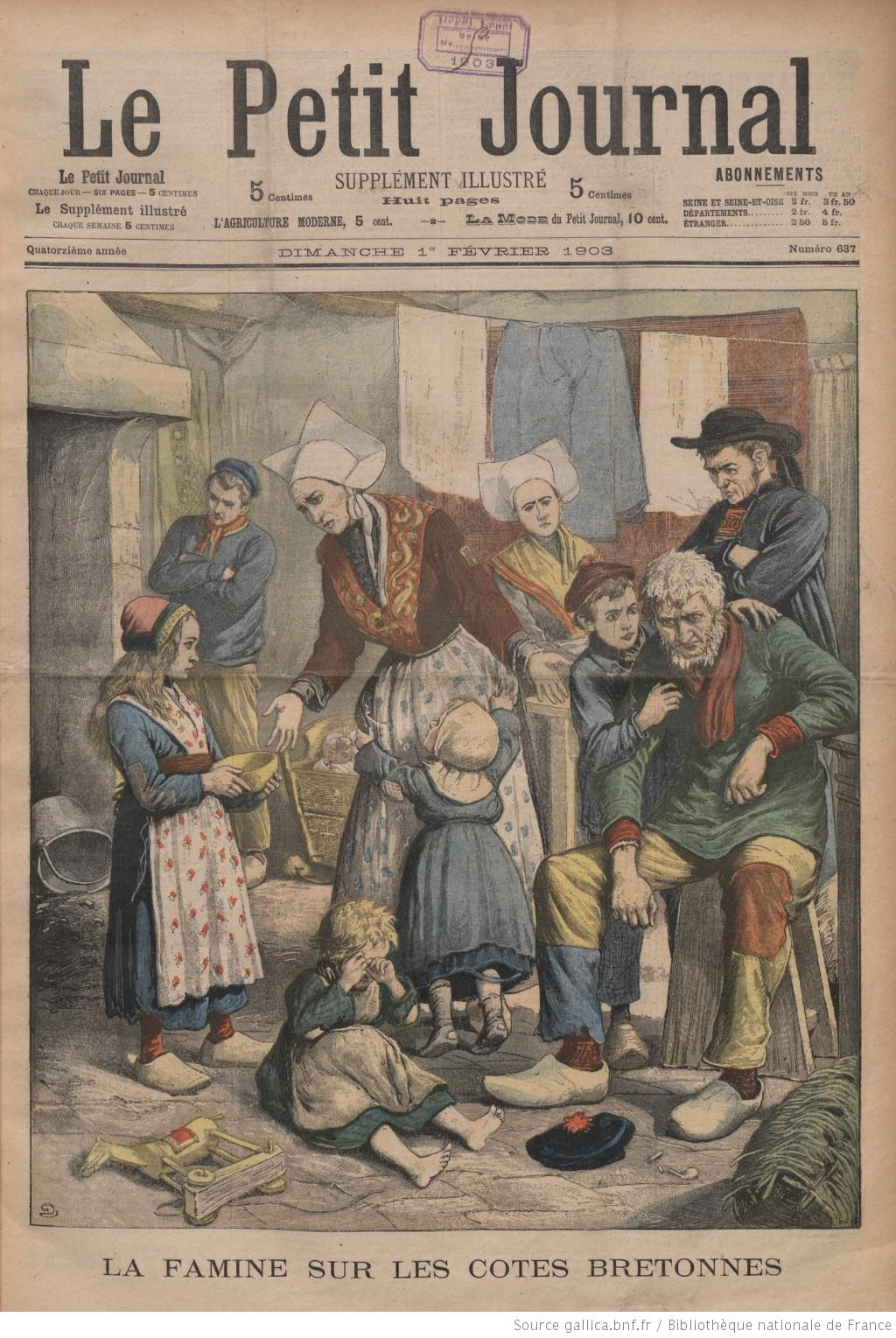 Première page du "petit Journal. Supplément du Dimanche" en date du 1er février 1903, intitulé "La famine sur les côtes bretonnes"